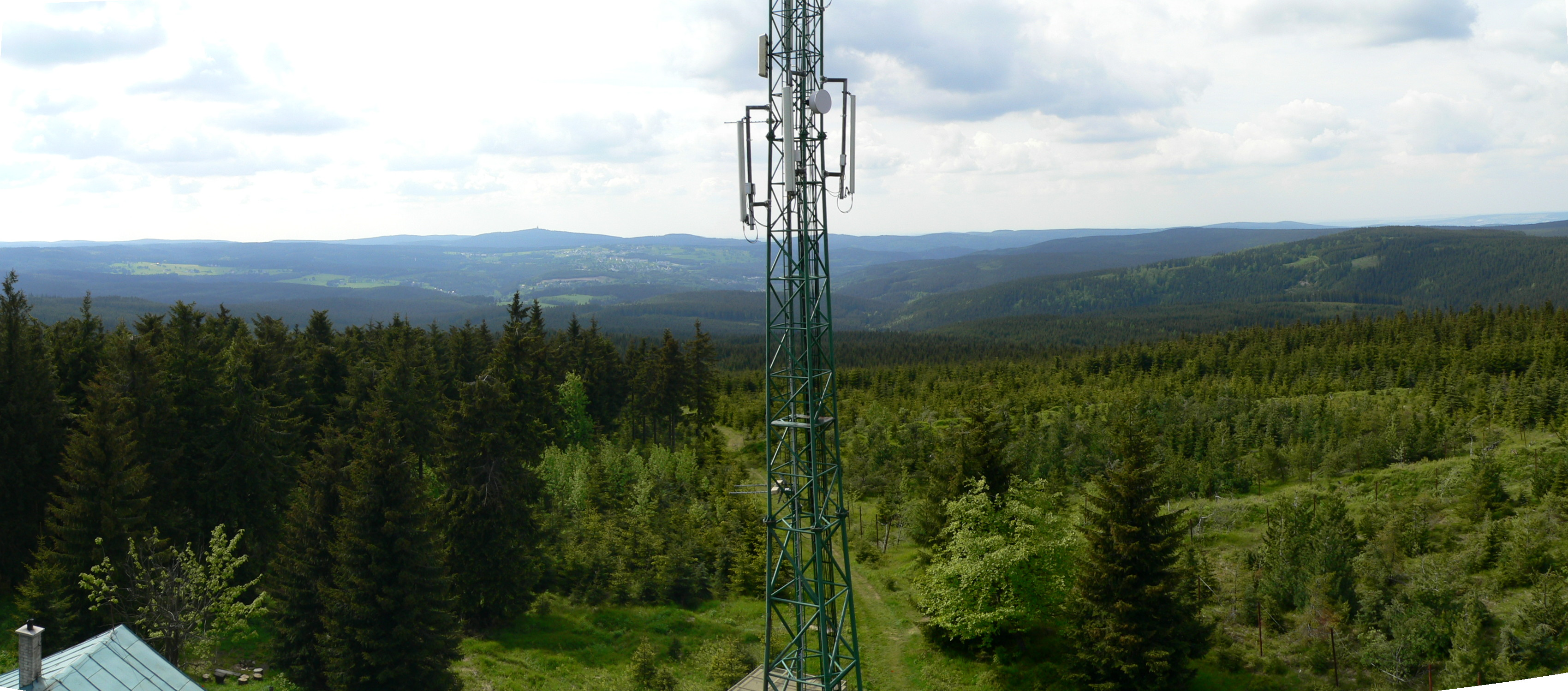 Panorama z rozhledny na Blatenském vrchu.